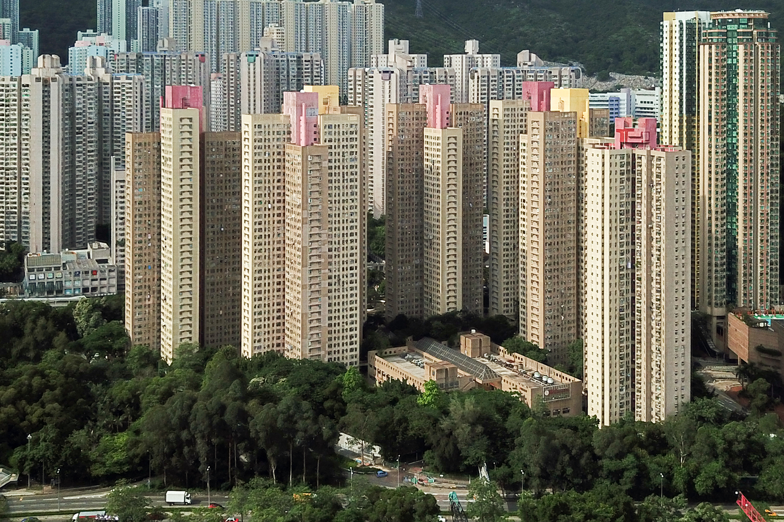 Lung Poon Court